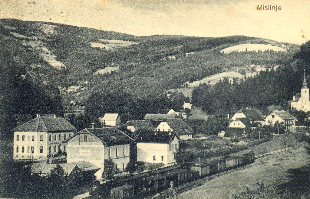 Razglednica Mislinje.